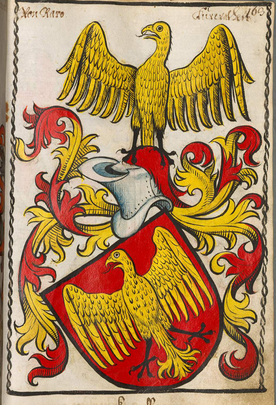 Scheibler'sches Wappenbuch , älterer Teil; Seite 163 Von Raro Churwalchen